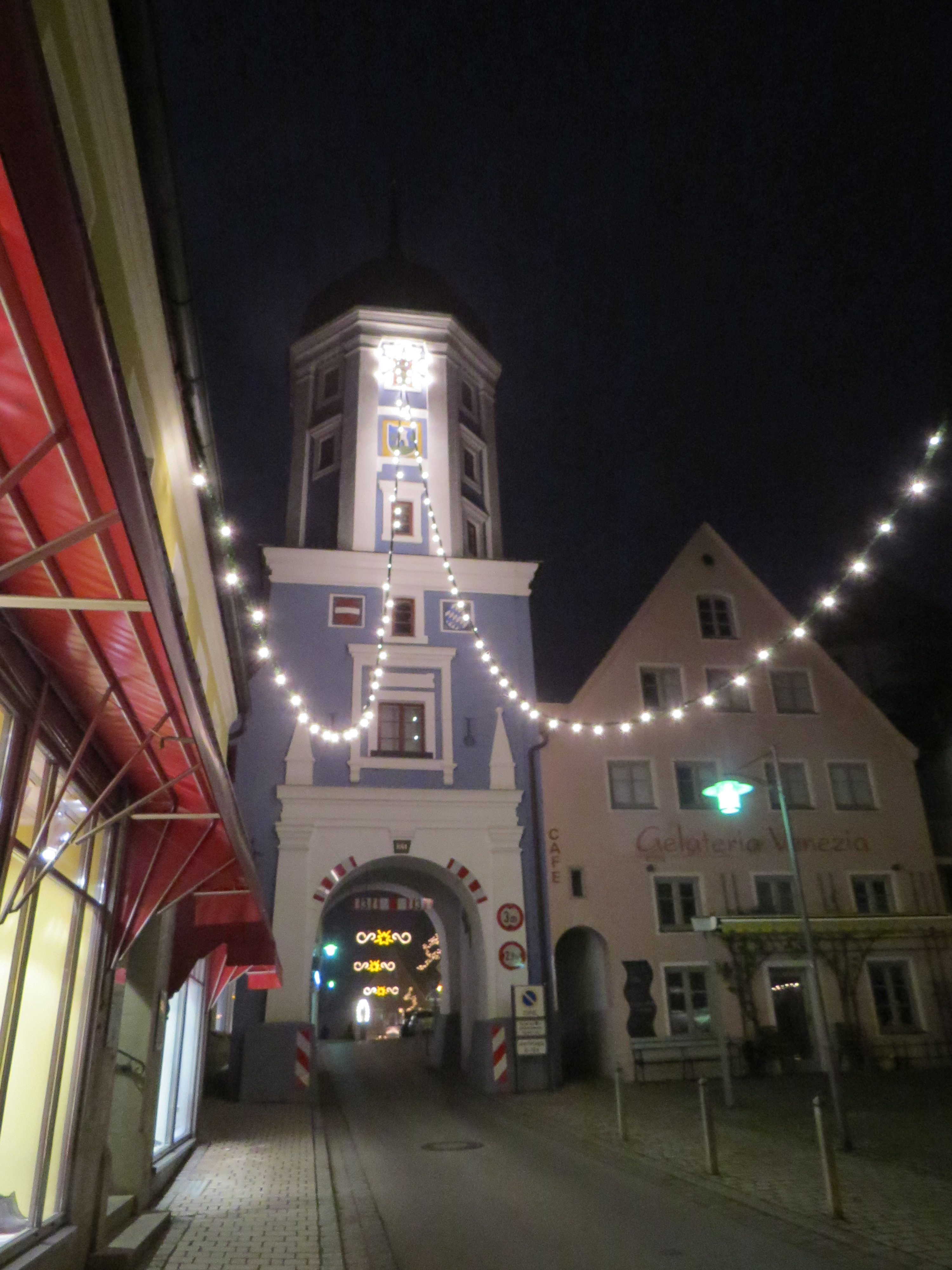 Blockhausturm in Burgau